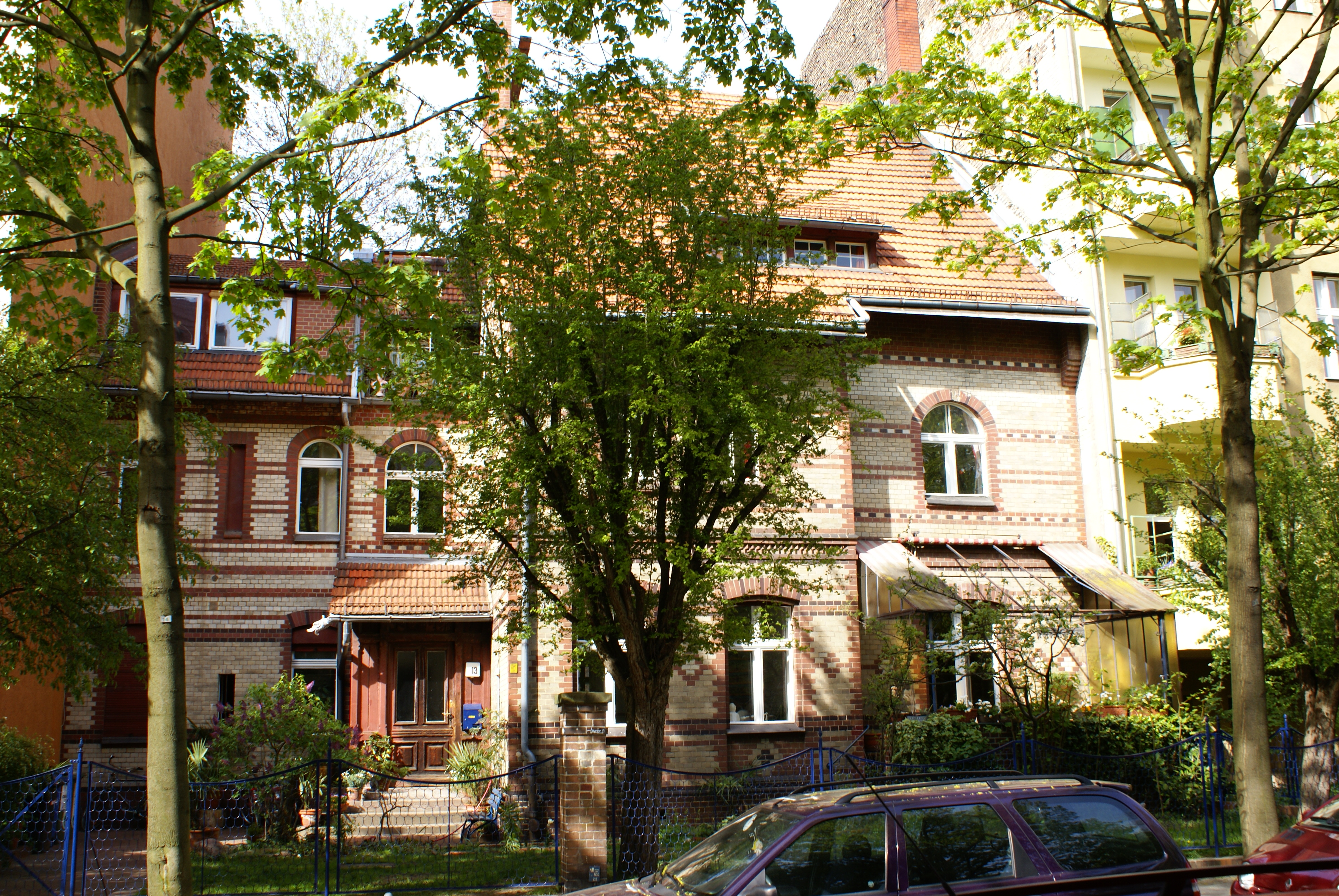 Landhaus Niedstraße 13 in Berlin-Friedenau, 1882 von Max Nagel